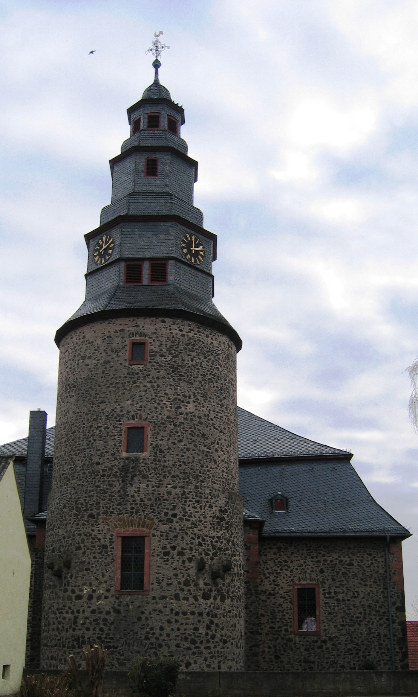 Kirchturm der Evangelisch-reformierten Kirche in Wölfersheim (Nordseite des Turms (also Blickrichtung Süden))